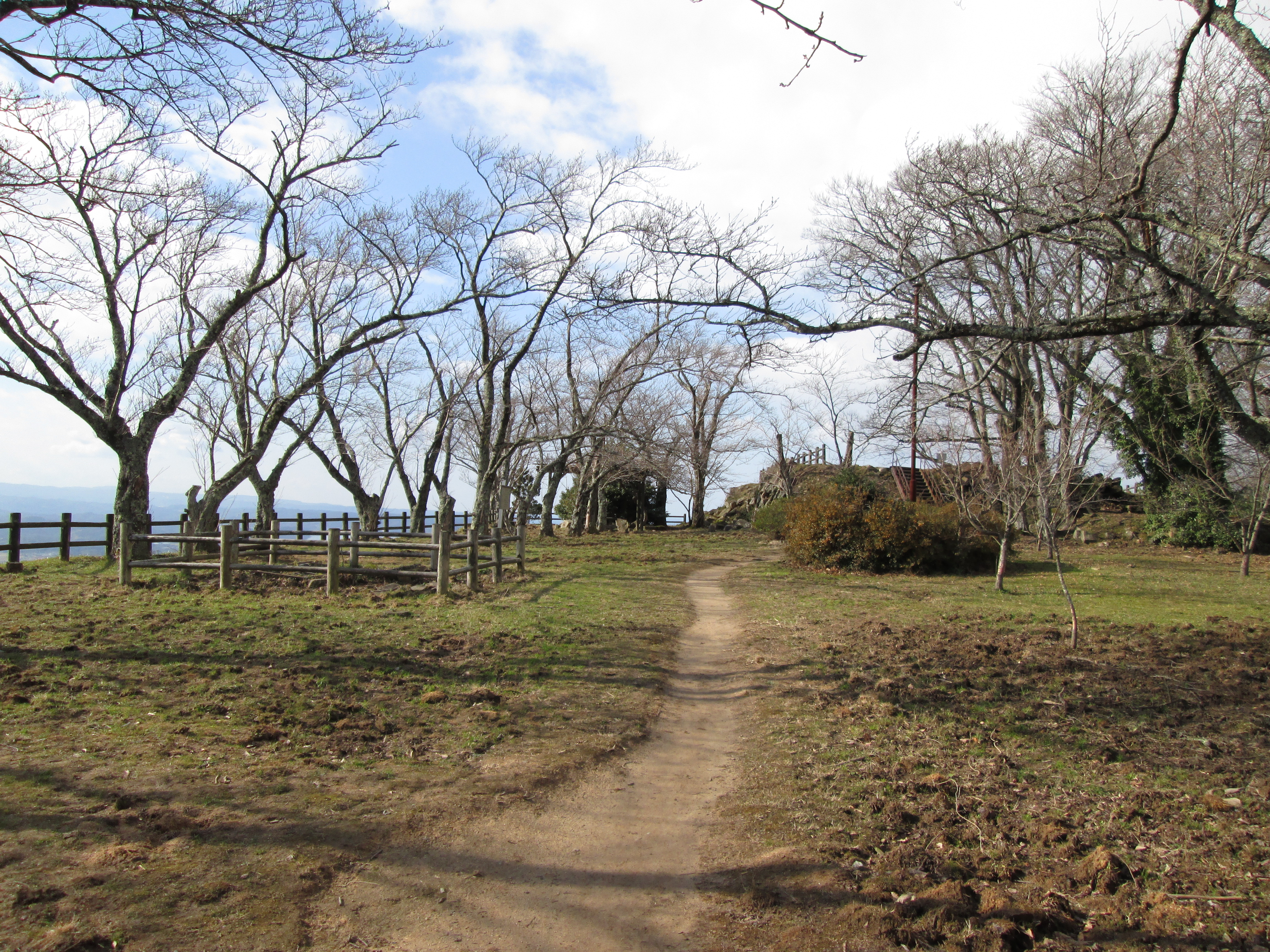 鳥取城の本丸跡。鳥取城の山頂より撮影。